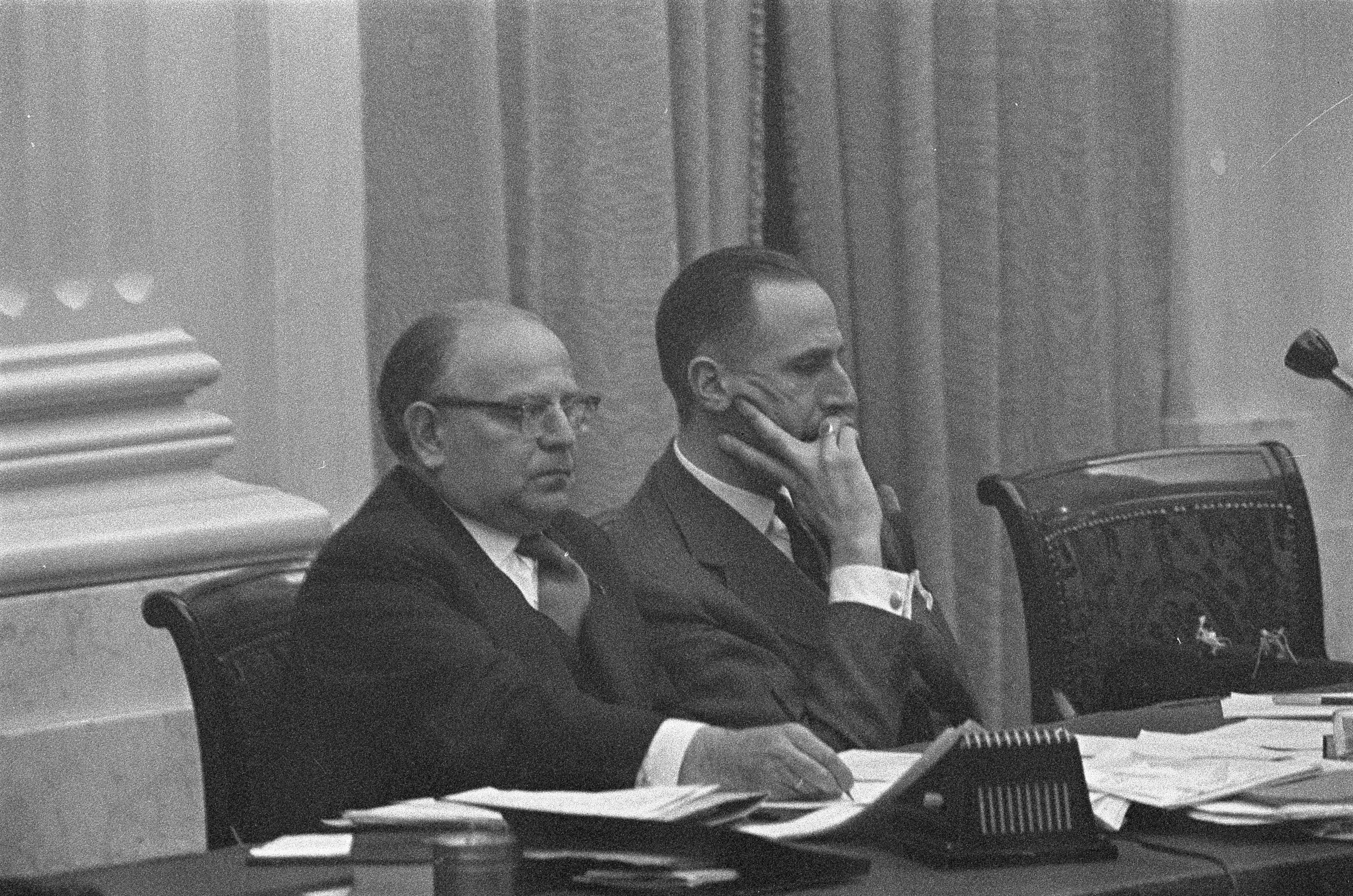 Collectie / Archief : Fotocollectie Anefo Reportage / Serie : [ onbekend ] Beschrijving : Begroting van Verkeer en Waterstaat in de Tweede Kamer Roemers tijdens debat, beeldje 45 Datum : 16 februari 1960 Trefwoorden : Begrotingen, Debatten, beeldjes Persoonsnaam : Roemers, Dirk Instellingsnaam : Ministerie van Verkeer en Waterstaat Fotograaf : Rossem, Wim van / Anefo Auteursrechthebbende : Nationaal Archief Materiaalsoort : Negatief (zwart/wit) Nummer archiefinventaris : bekijk toegang 2.24.01.05 Bestanddeelnummer : 911-0345